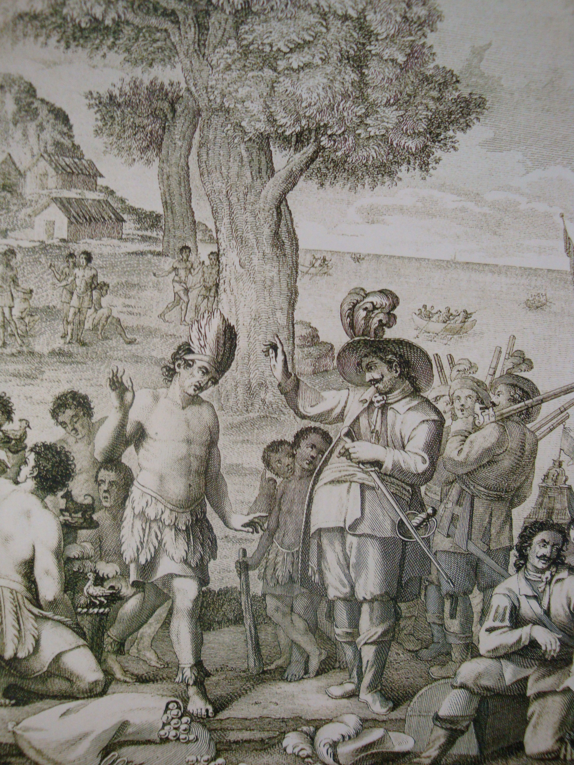 Encuentro entre Juan de Grijalva y el cacique maya Tabscoob, ocurrido en Potonchán en 1518. Detalle del mural público realizado por el maestro Héctor Quintana para el Gobierno del Estado de Tabasco.